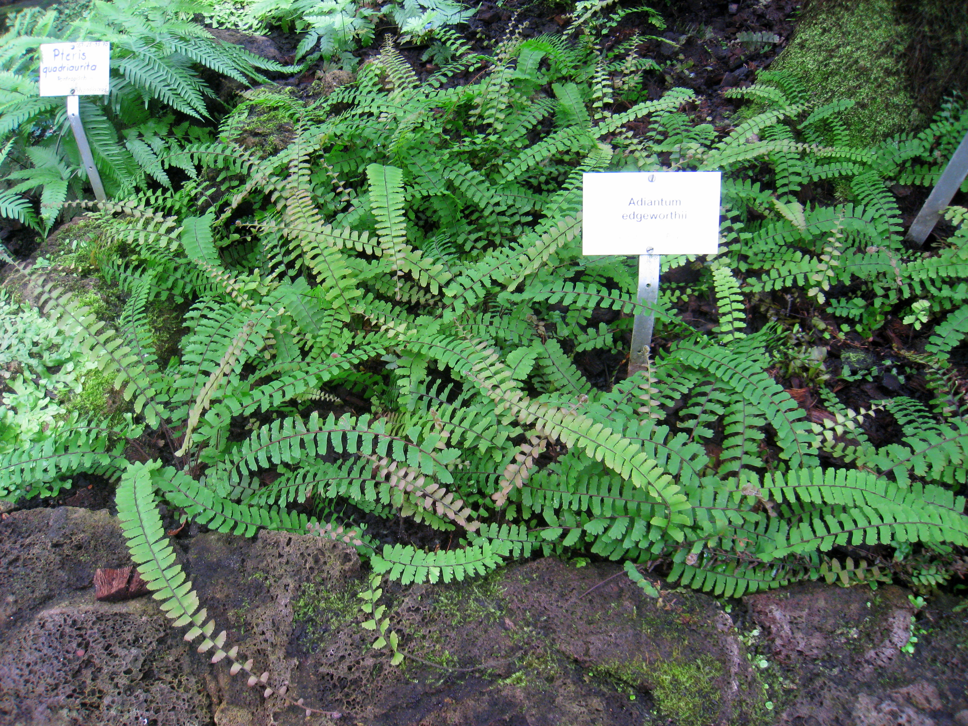 Adiantum edgeworthii specimen in the Botanischer Garten, Berlin-Dahlem (Berlin Botanical Garden), Berlin, Germany.